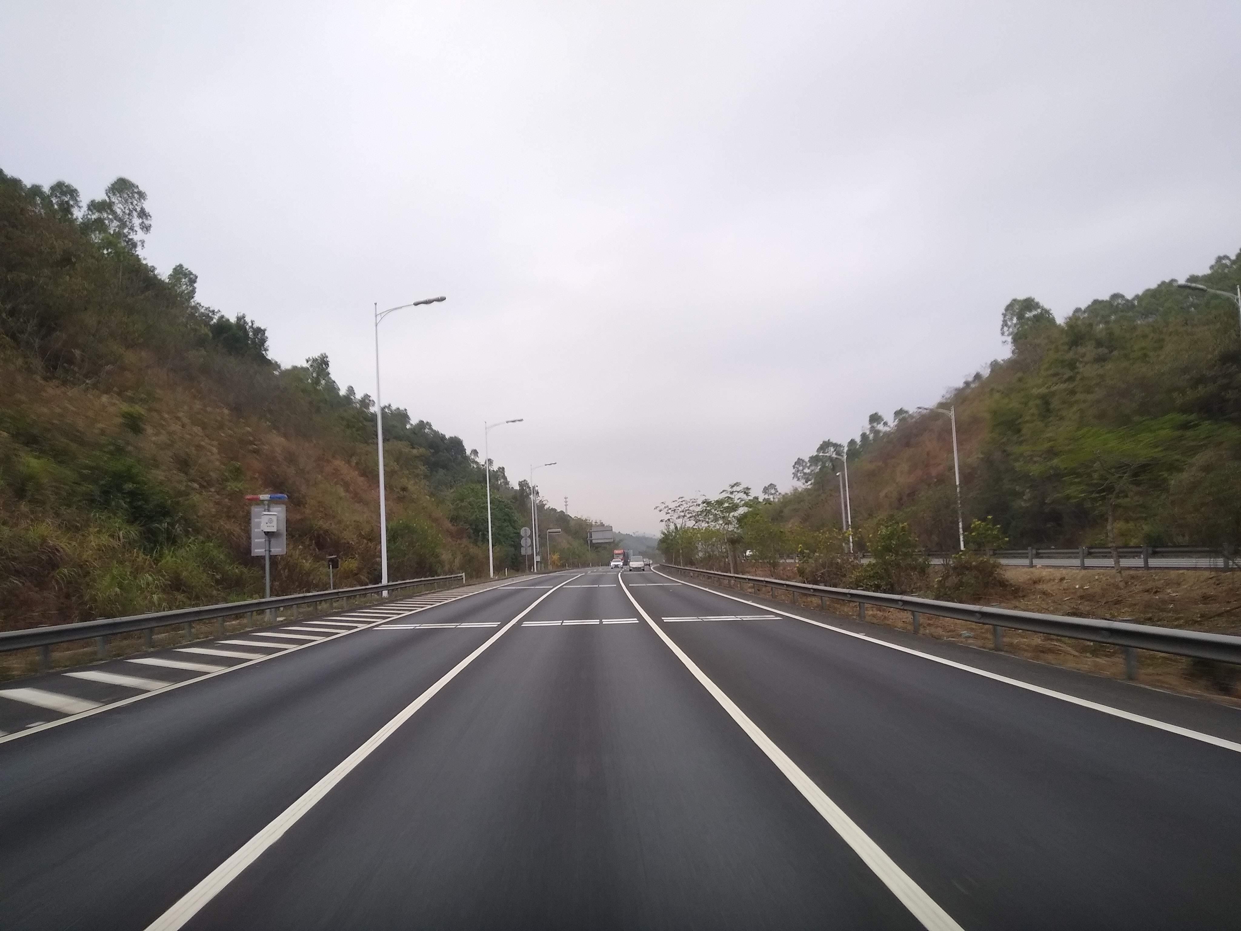 广河高速公路惠州段